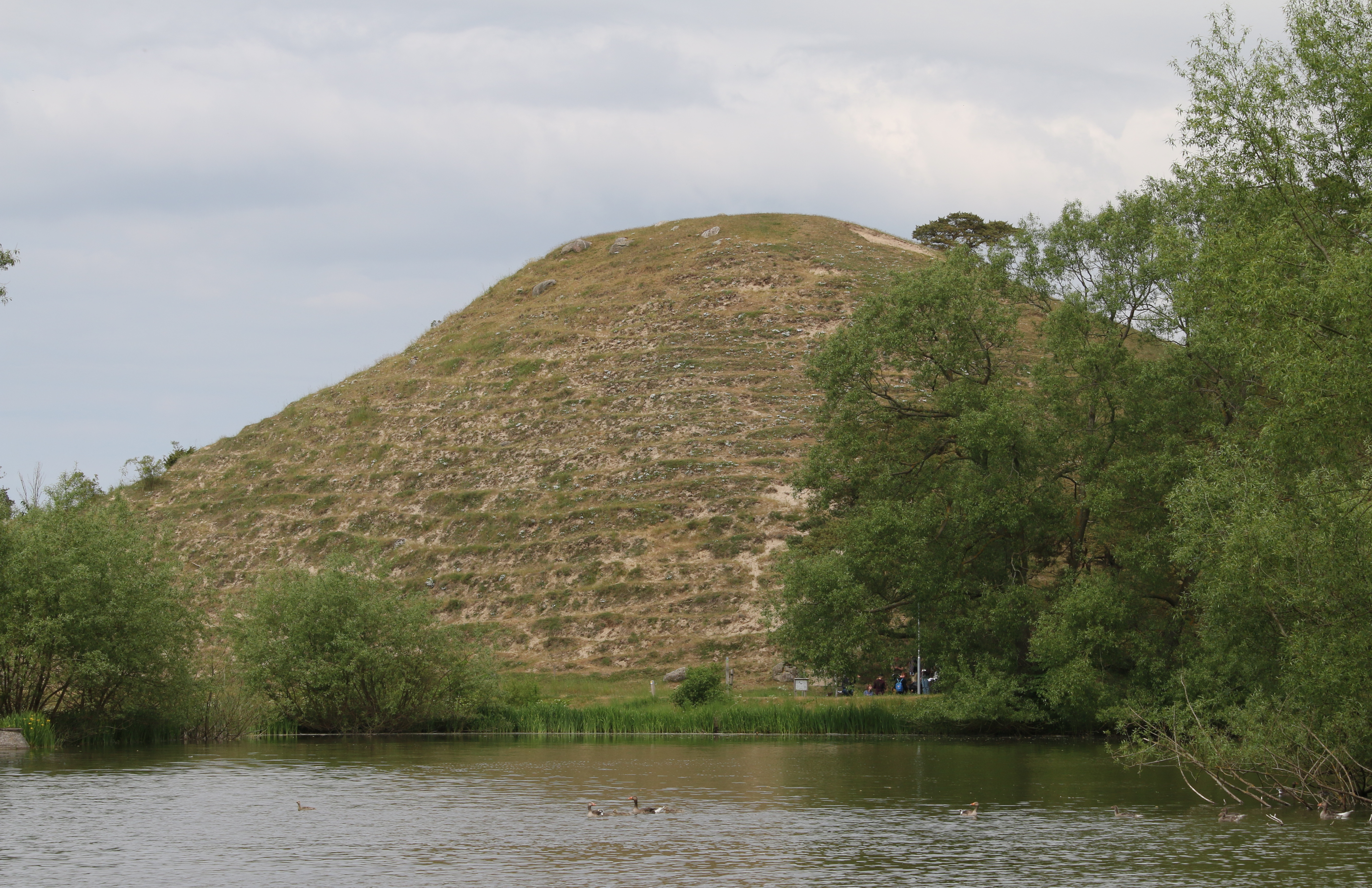 Sockertoppen, Degeberga backar